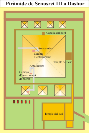 Pirámide de Sesostris III en Dahshur